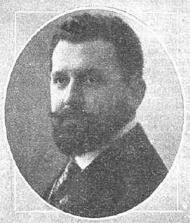 Fotografía del médico y político español Vicente Gimeno publicada en 1914 con motivo de la publicación de su libro Método oprónico